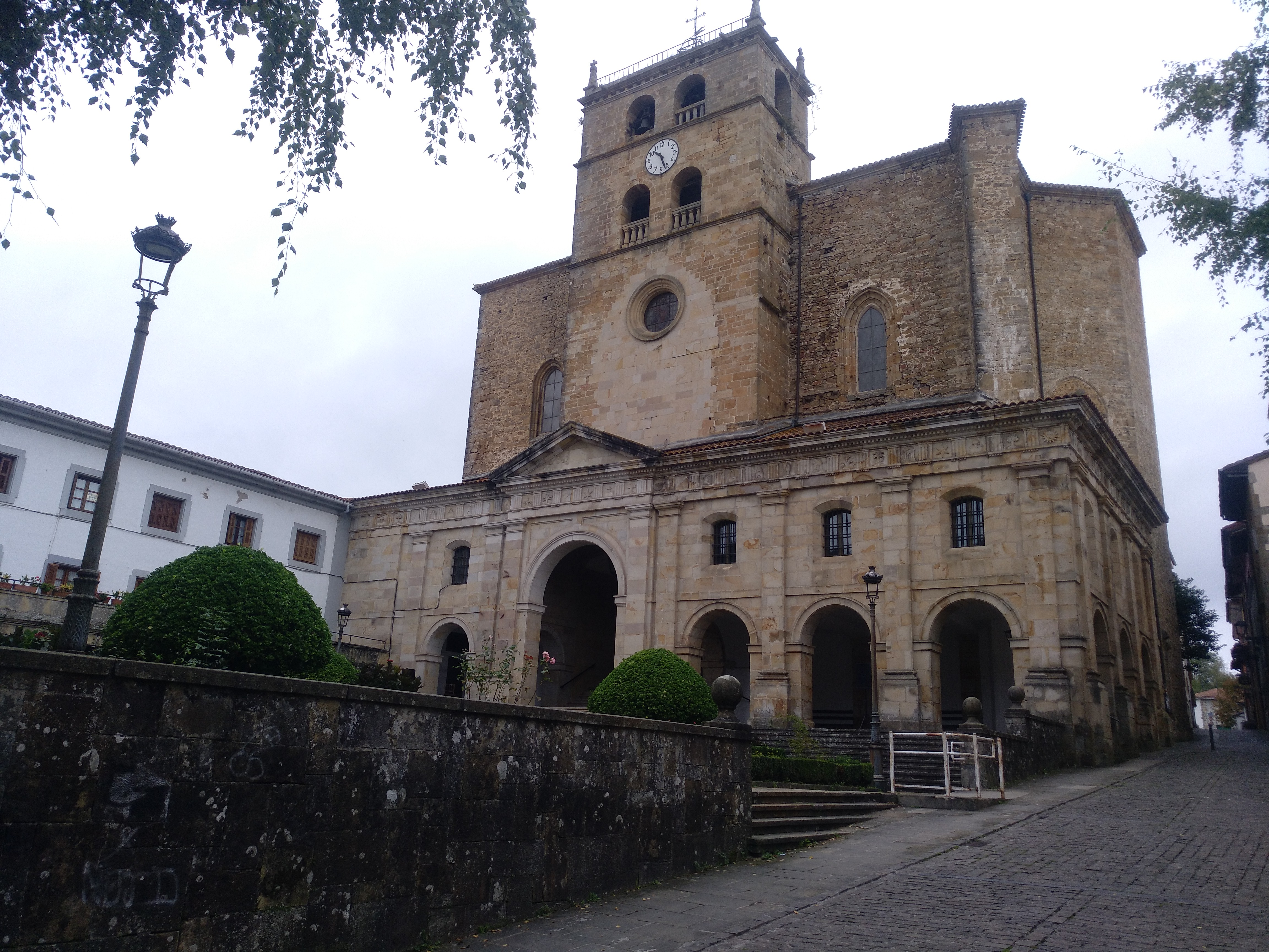 Elgetako Jasokundeko Andre Mariaren parrokia